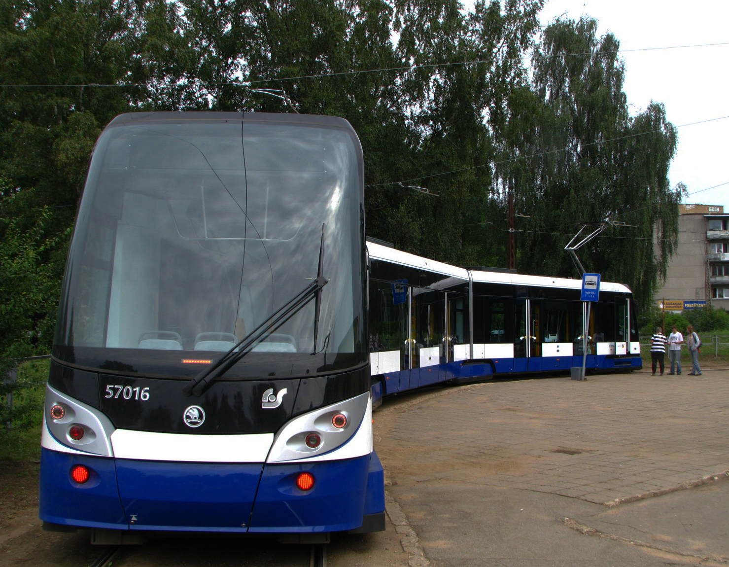 Tramvaja Škoda 15T aizmugure. Tramvajs atrodas 6. tramvaju maršruta galpunktā "Jugla"